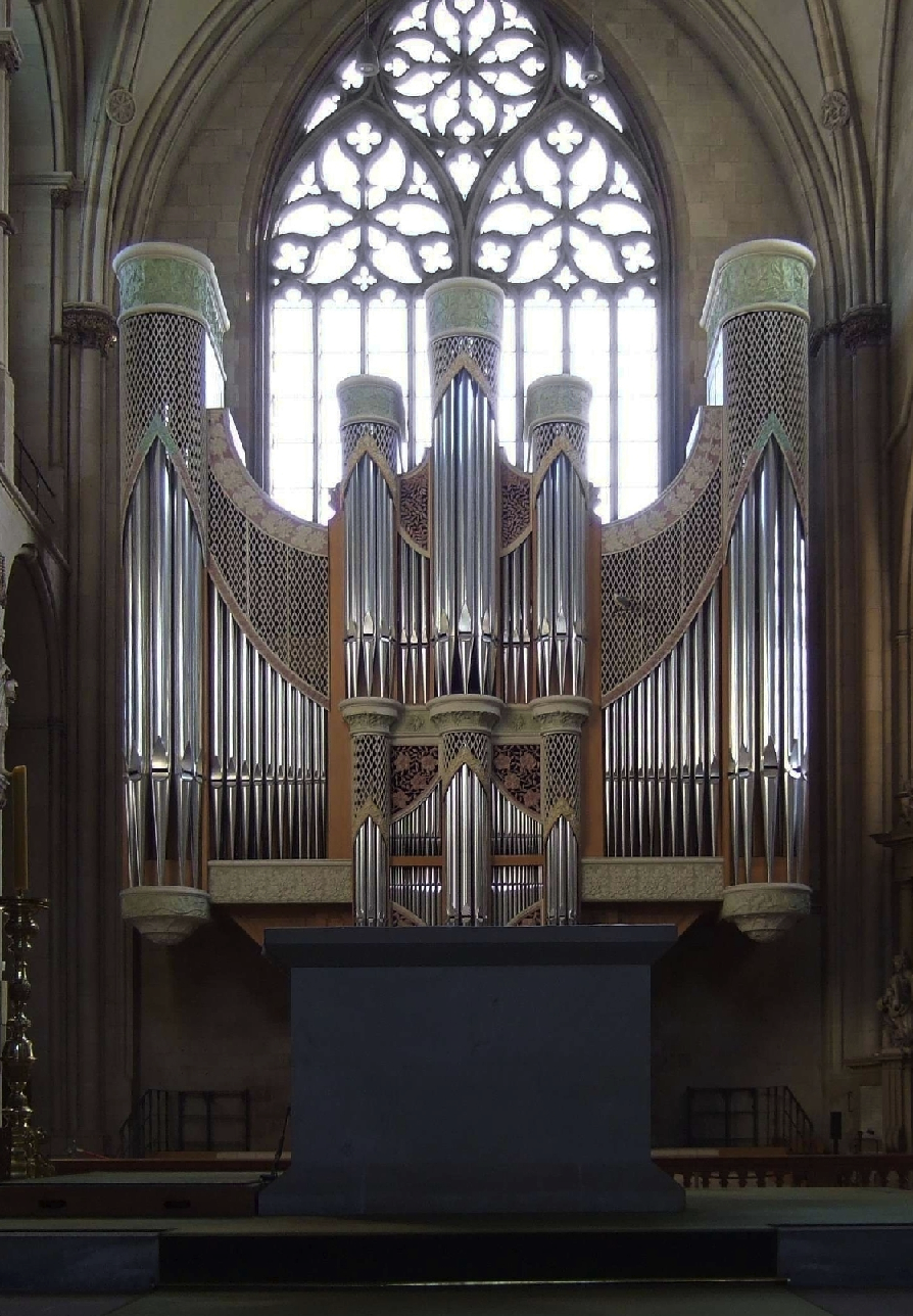 Ausschnitt aus dem Bild Datei:Muenster domorgel.jpg (gemeinfrei)